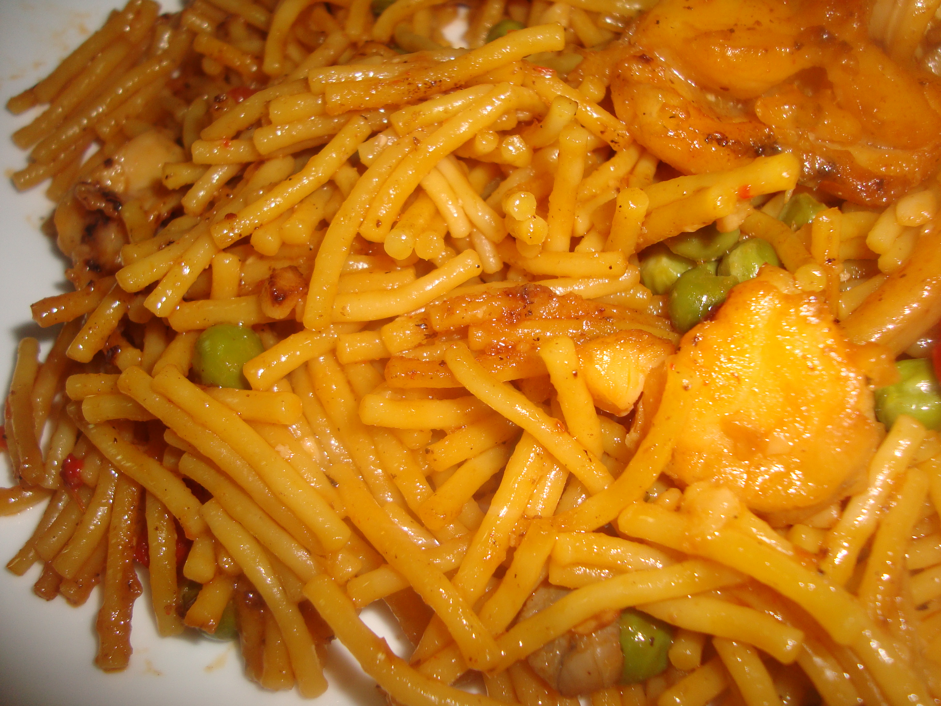 Plato de fideuá de sepia y gambas (Comunidad Valenciana)